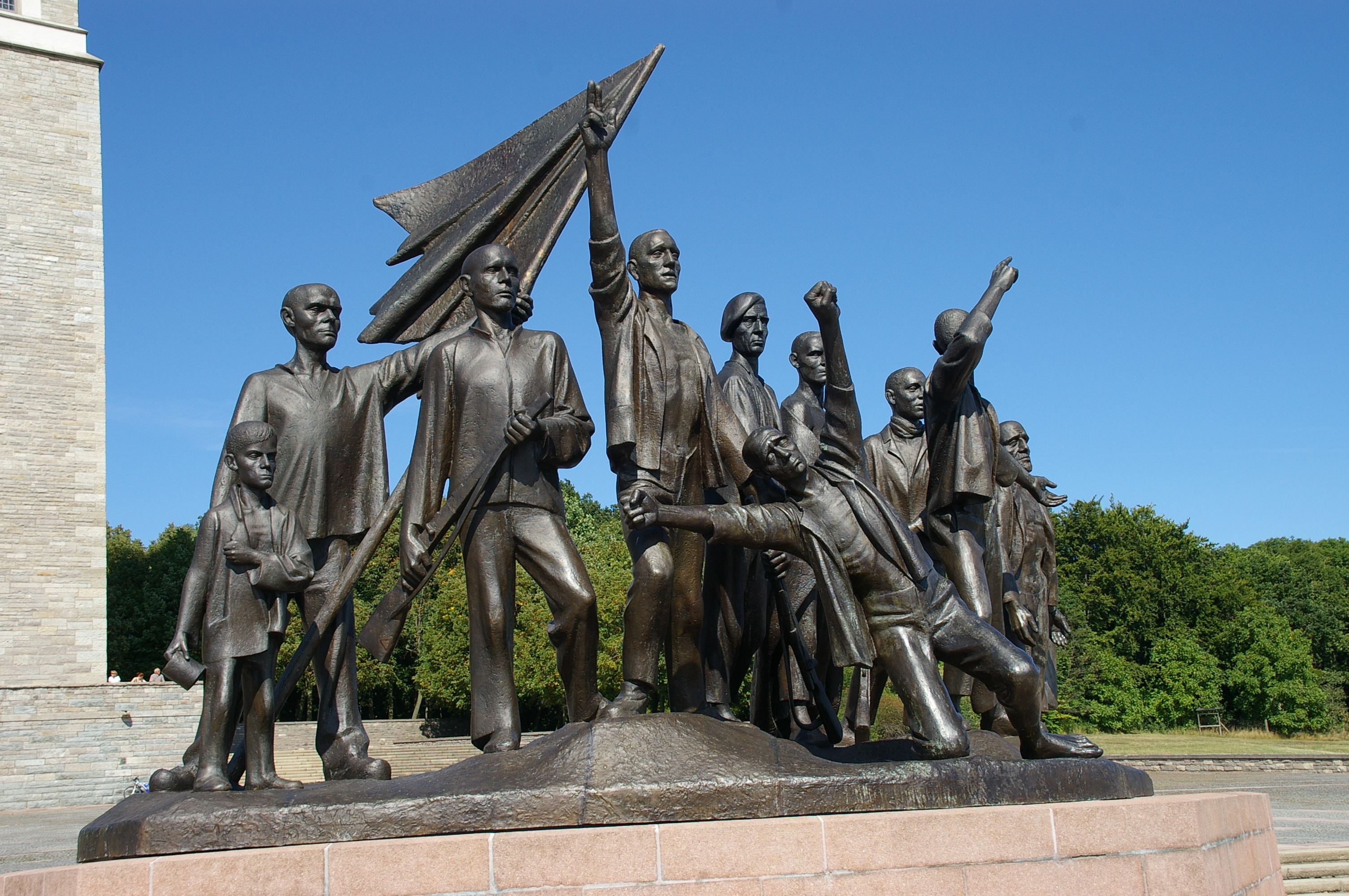 Figurengruppe des Buchenwalddenkmales in Weimar